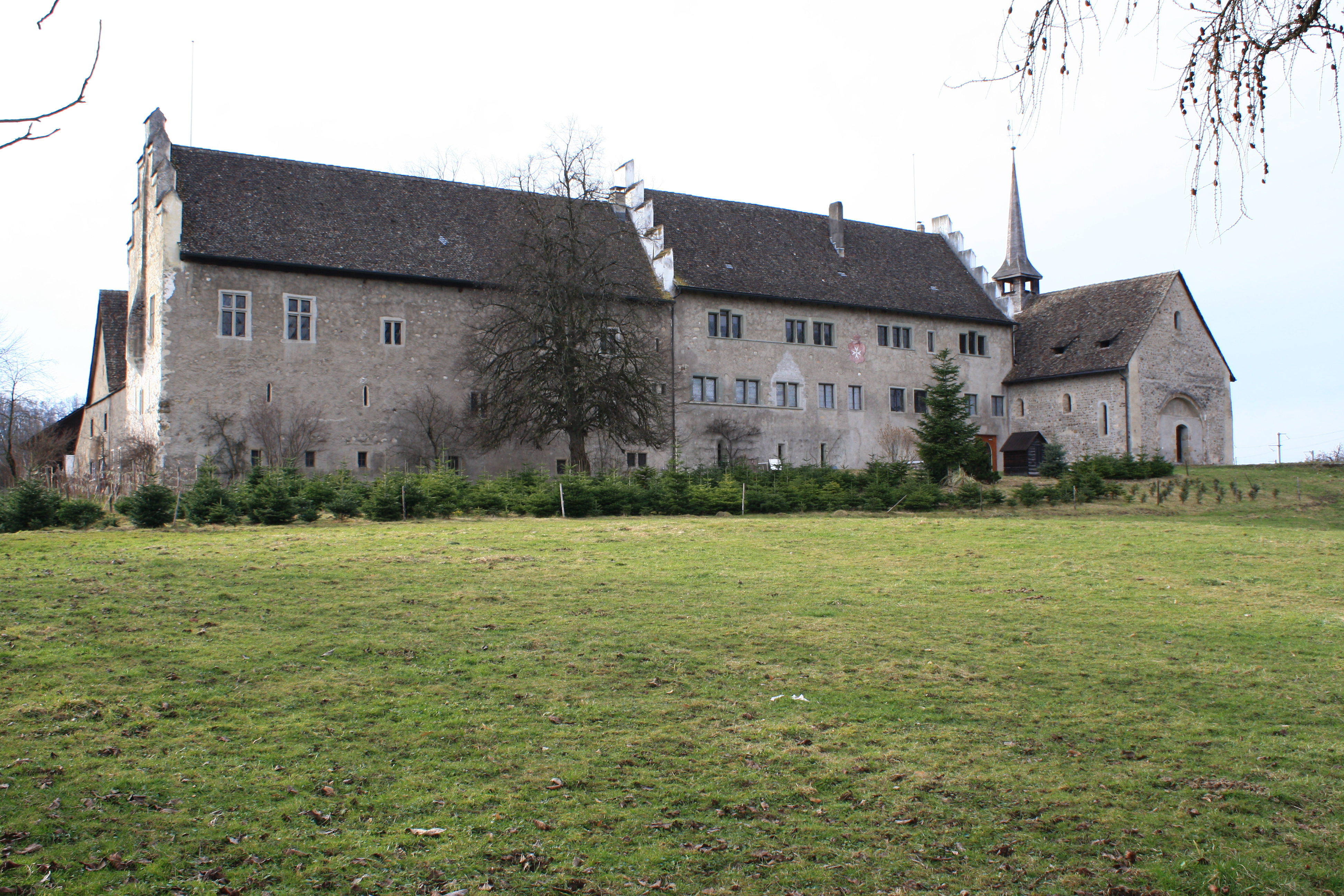 Ritterhaus in Bubikon (Switzerland)